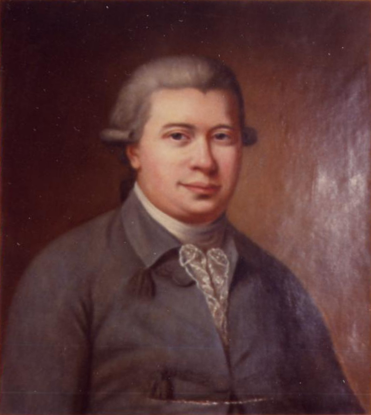 Portrait de Jean-Baptiste III van Dievoet (1747-1821), époux d'Anne-Marie Lambrechts, attribué à Antoine Cardon Il s'agit du portrait de: Jean-Baptiste van DIEVOET, né à Bruxelles le 24 janvier 1747, baptisé à Saint-Nicolas et décédé à Bruxelles le 30 décembre 1821 épousa à Bruxelles à Sainte-Catherine le 12 septembre 1774 Anne-Marie Françoise LAMBRECHTS, fille de Jean-Louis Lambrechts et de Marie François, née à Bruxelles le 22 février 1753, baptisée à Sainte-Catherine, décédée à Bruxelles le 23 septembre 1781 et enterrée dans l'église de Saint-Nicolas (Service à seize prêtres). Bibliographie : « Généalogie de la famille van Dievoet originaire de Bruxelles, dite Vandive à Paris », dans Le Parchemin, (Bulletin bimestriel édité par l’Office Généalogique et Héraldique de Belgique, sous le Haut Patronage de S. M. la reine Marie José), n° 245, Bruxelles, 1986, page 274 à 293. (Voir page 287).